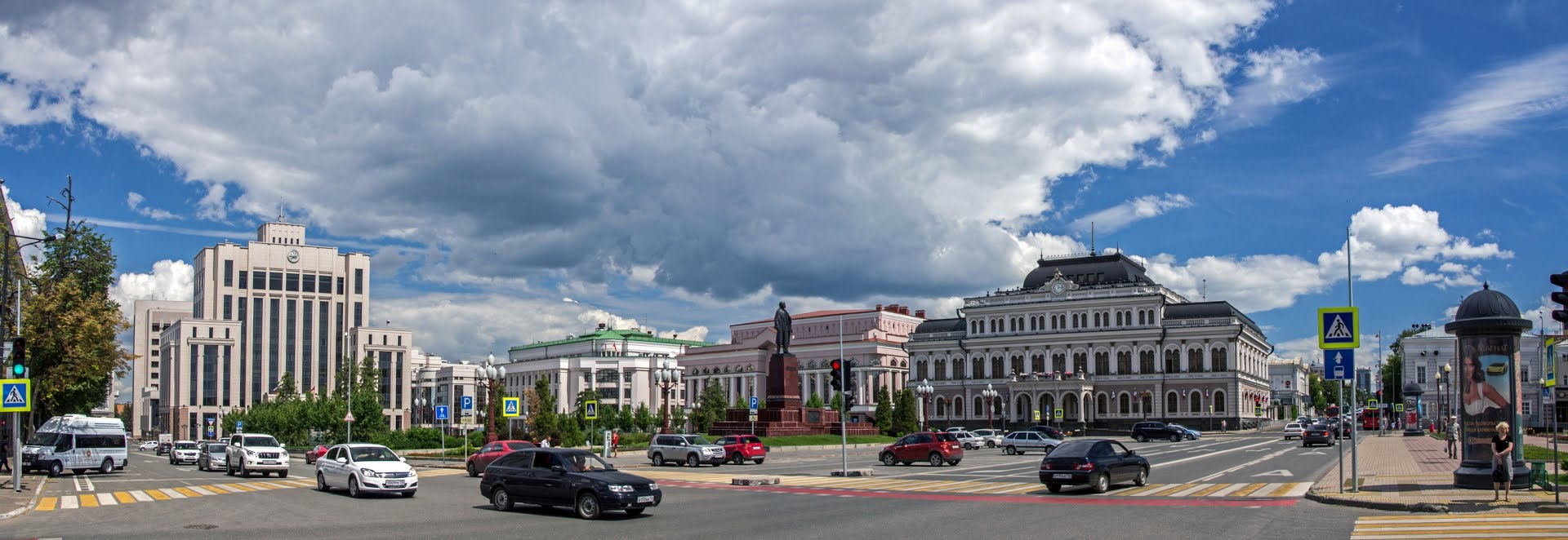 Здание дворянского собрания, здесь выступал поэт В.В. Маяковский: площадь Свободы, 24, Казань, Татарстан